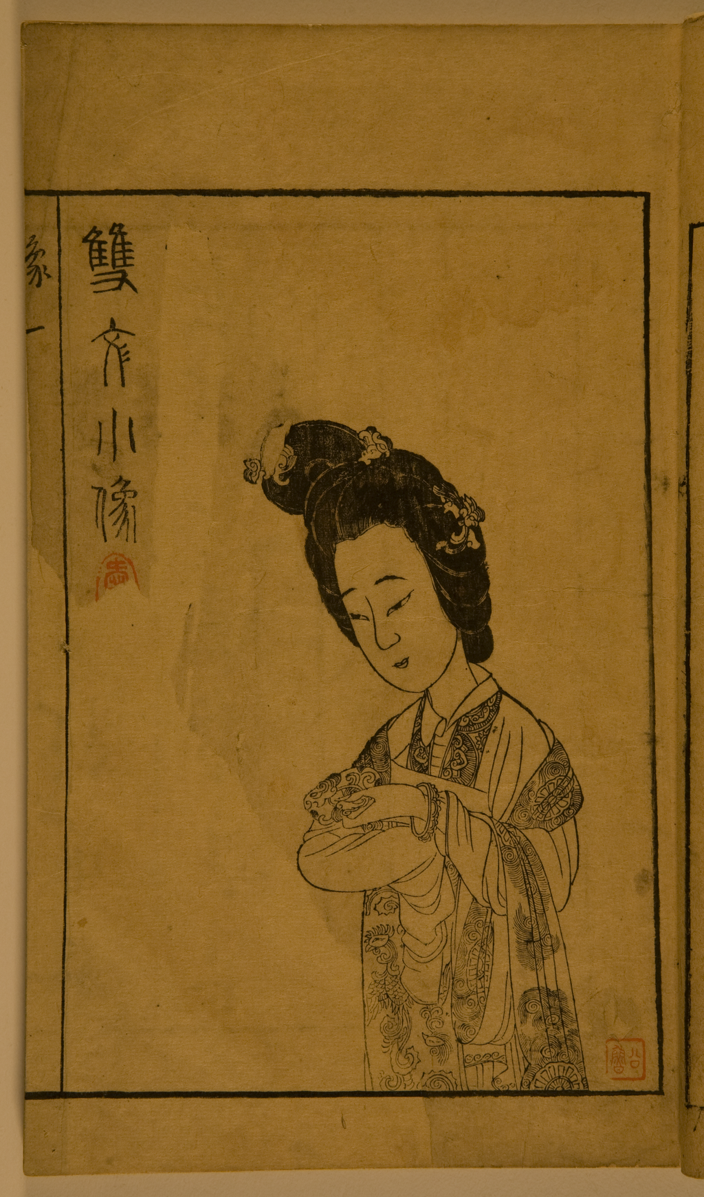 Édition secrète de L'aile nord-ouest, corrigée par M. Zhang Shenzhi. Illustrations de Chen Hongshou